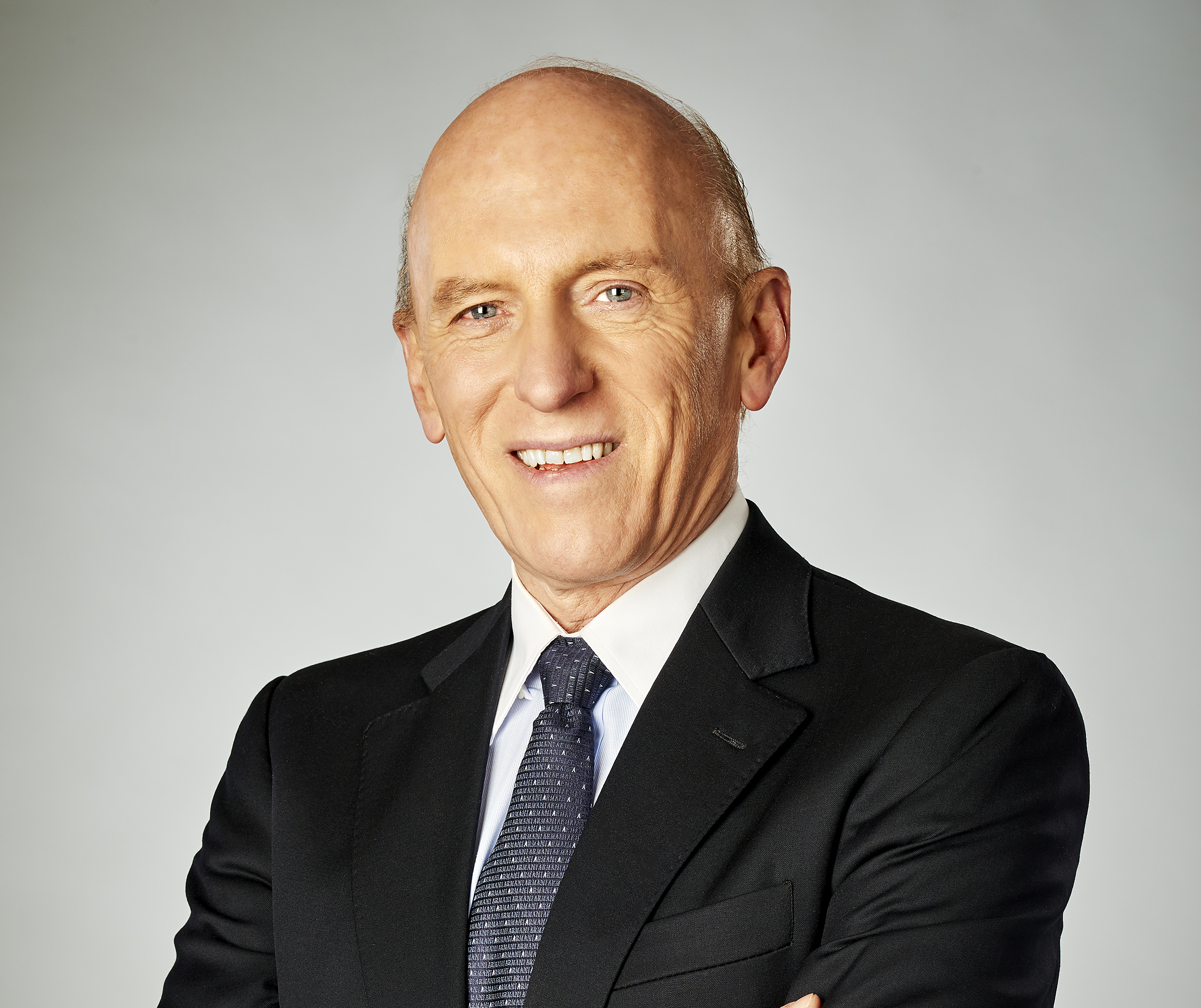 Catedrático de Oftalmología. Universidad Miguel Hernández, Elche (España). Especialista en Oftalmología. Subespecialidades en Córnea y Superficie Ocular. Catarata y Cirugía Refractiva. Director Científico - Vissum (Alicante. España).